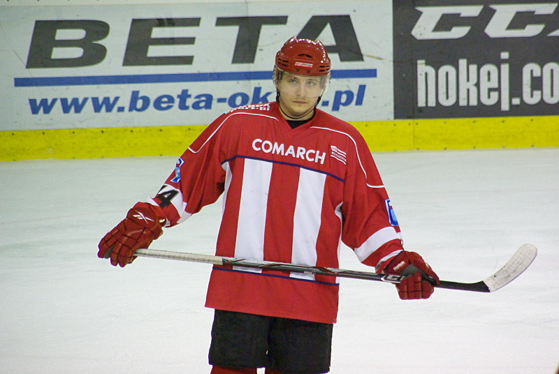 Nicolas Besch w barwach ComArch Cracovii podczas piątego meczu finałowego o Mistrzostwo Polski 2011/2012 z Ciarko PBS Bank Sanok (Arena Sanok, 14 marca 2012)